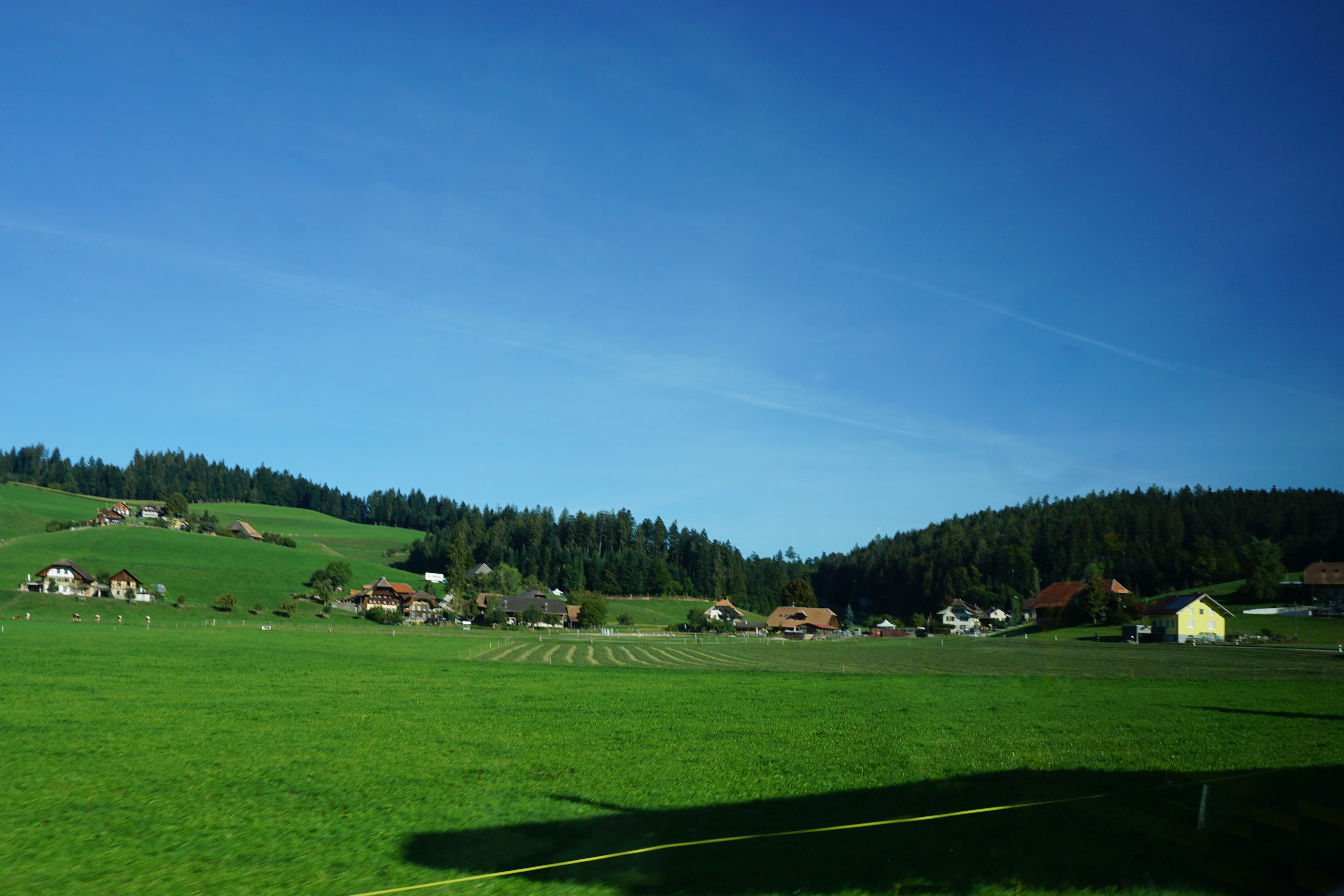 Hämlismatt